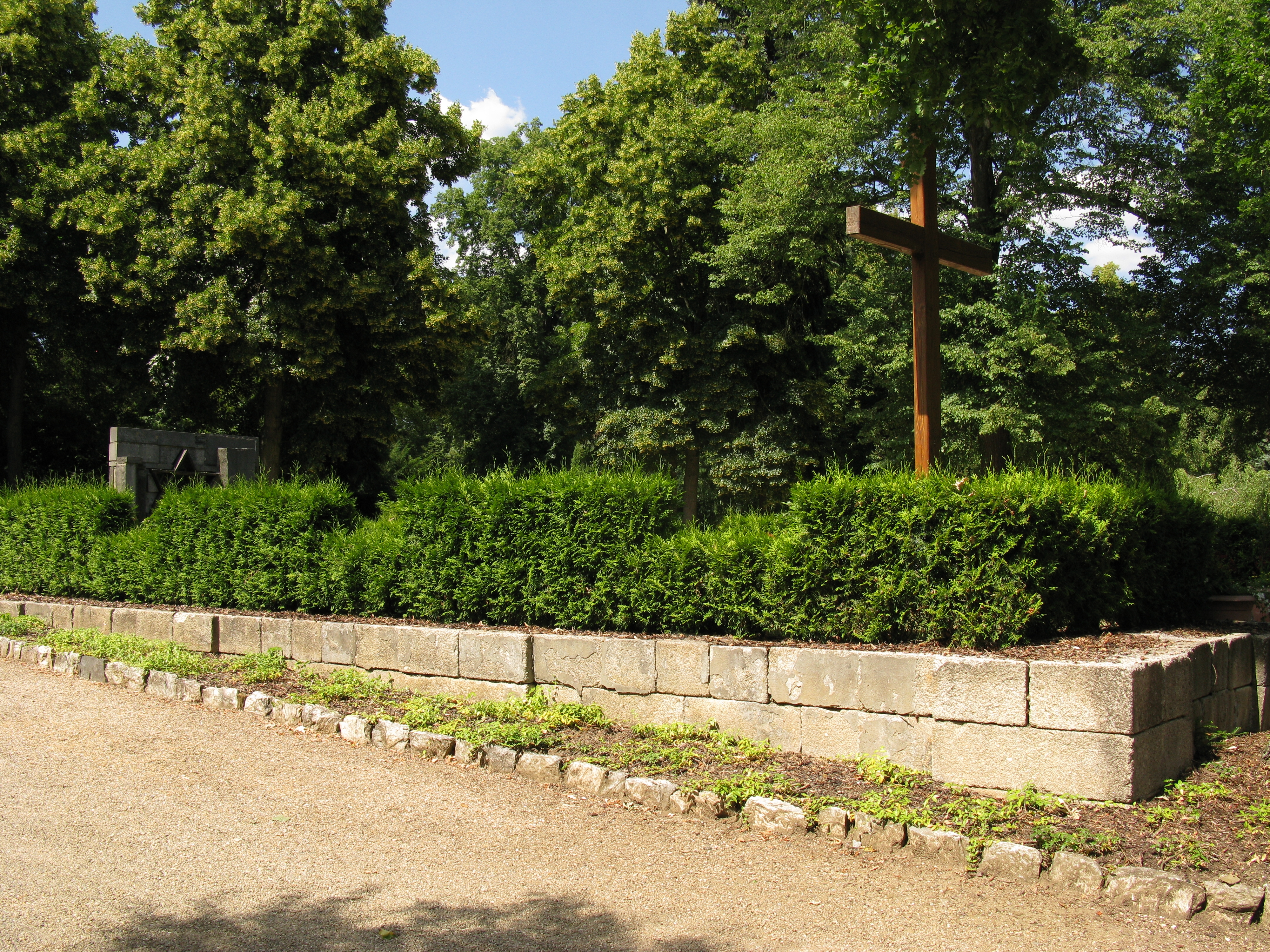 Plauen, Friedhof I - Gedenkstätte an der Stelle der ehemaligen Friedhofskapelle